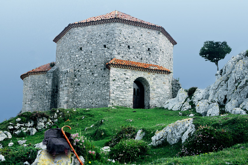 Capilla de arriba o Ermita de Santiago, en el monte Monsacro; Morcín, Asturias